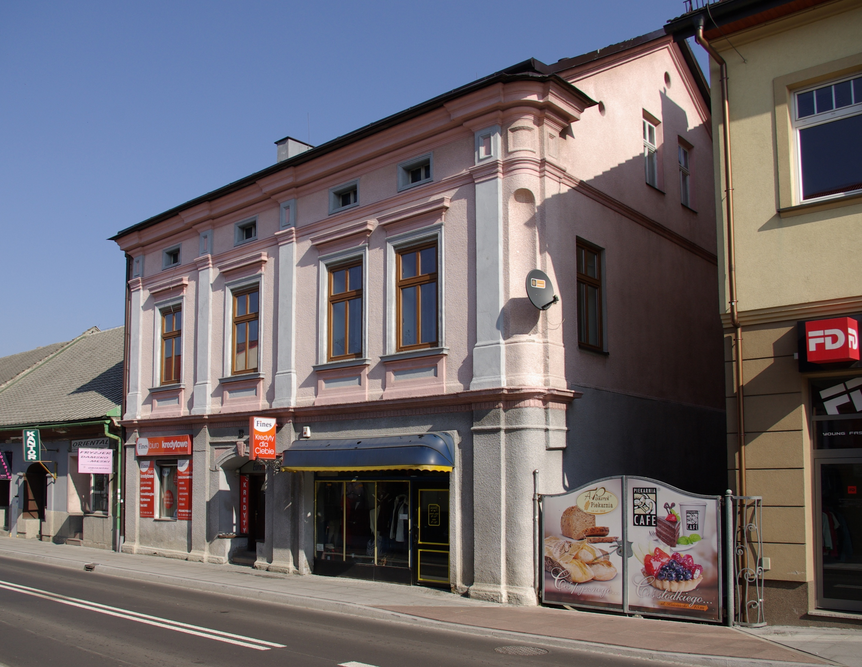 Kęty, ulica Tadeusza Kościuszki